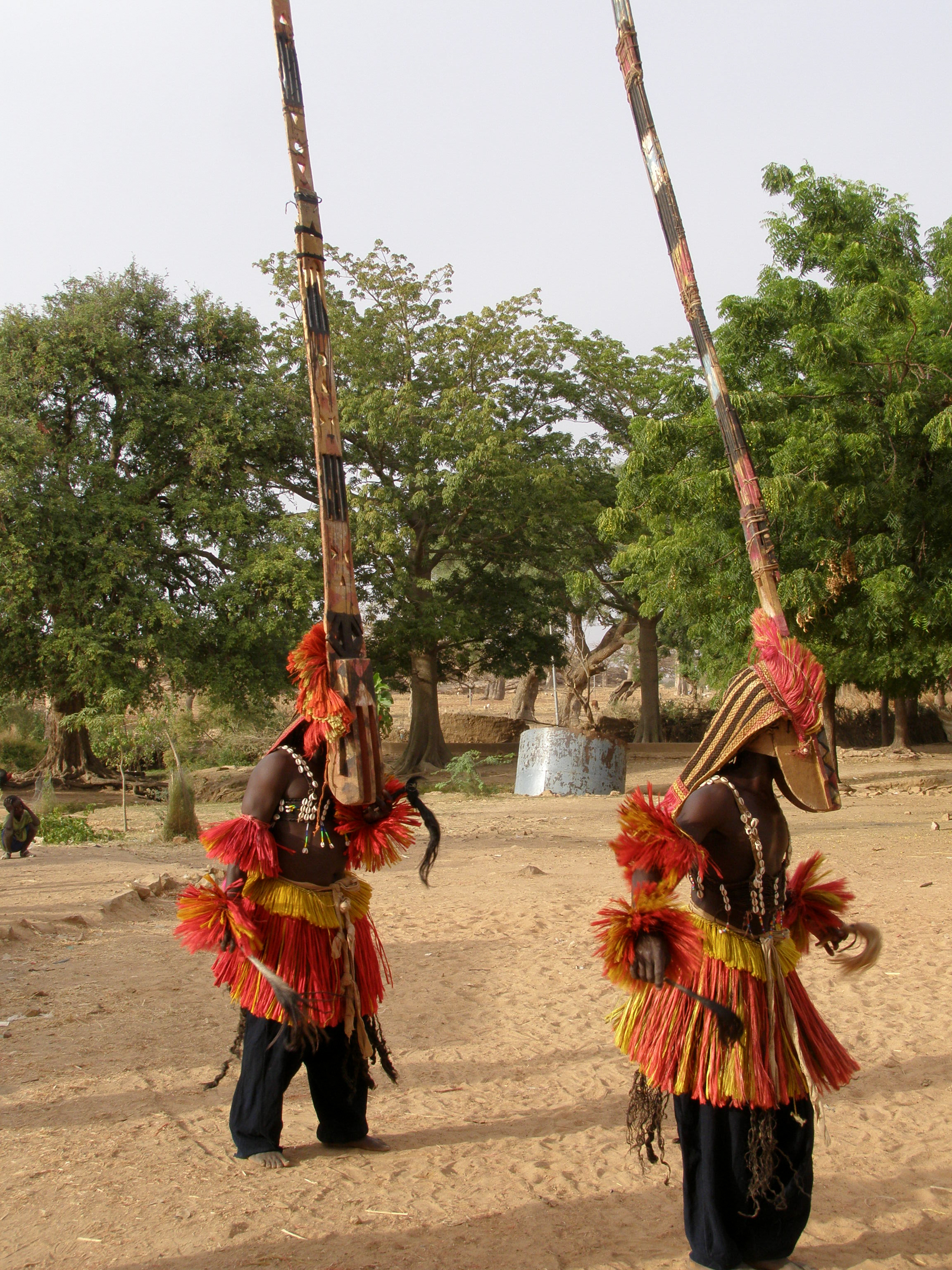 Masques Sirigé lors de la danse des masques au village de Sangha - Pays Dogon - Mali